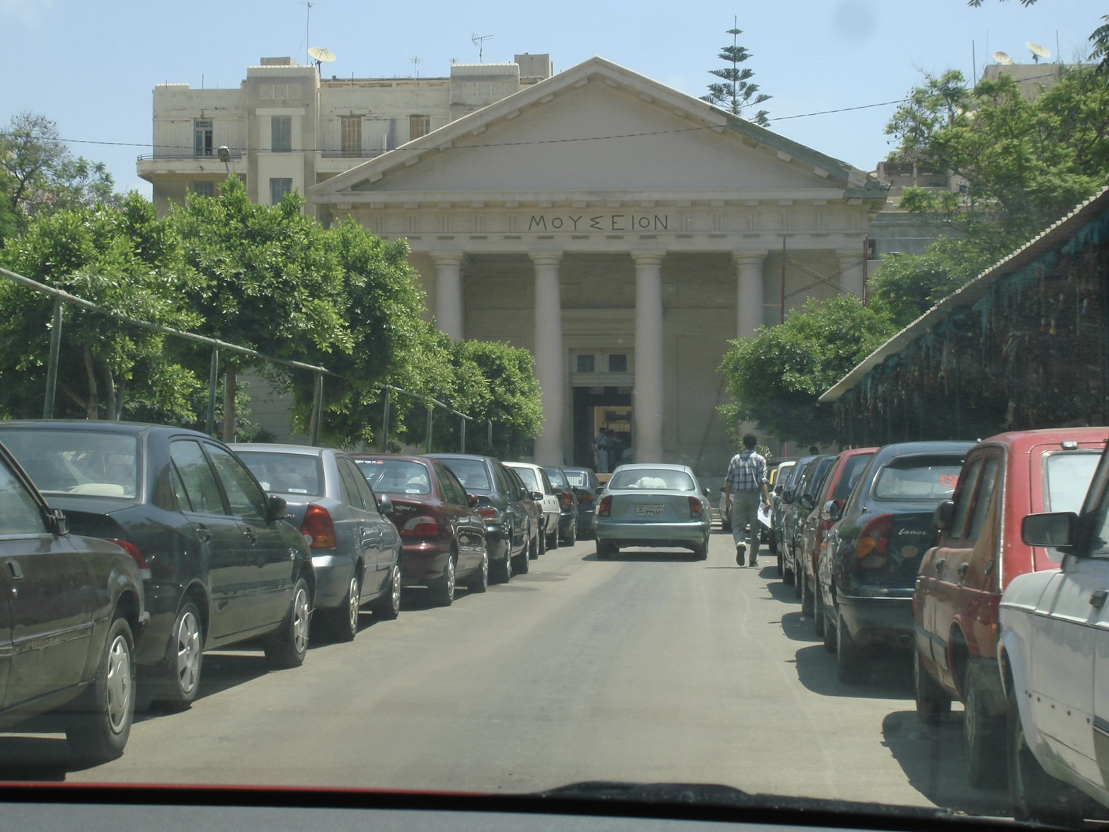 Greeko-Roman museum, Alexandria